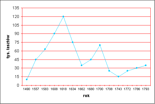 Eksport zboża przez Gdańsk w latach 1490-1793